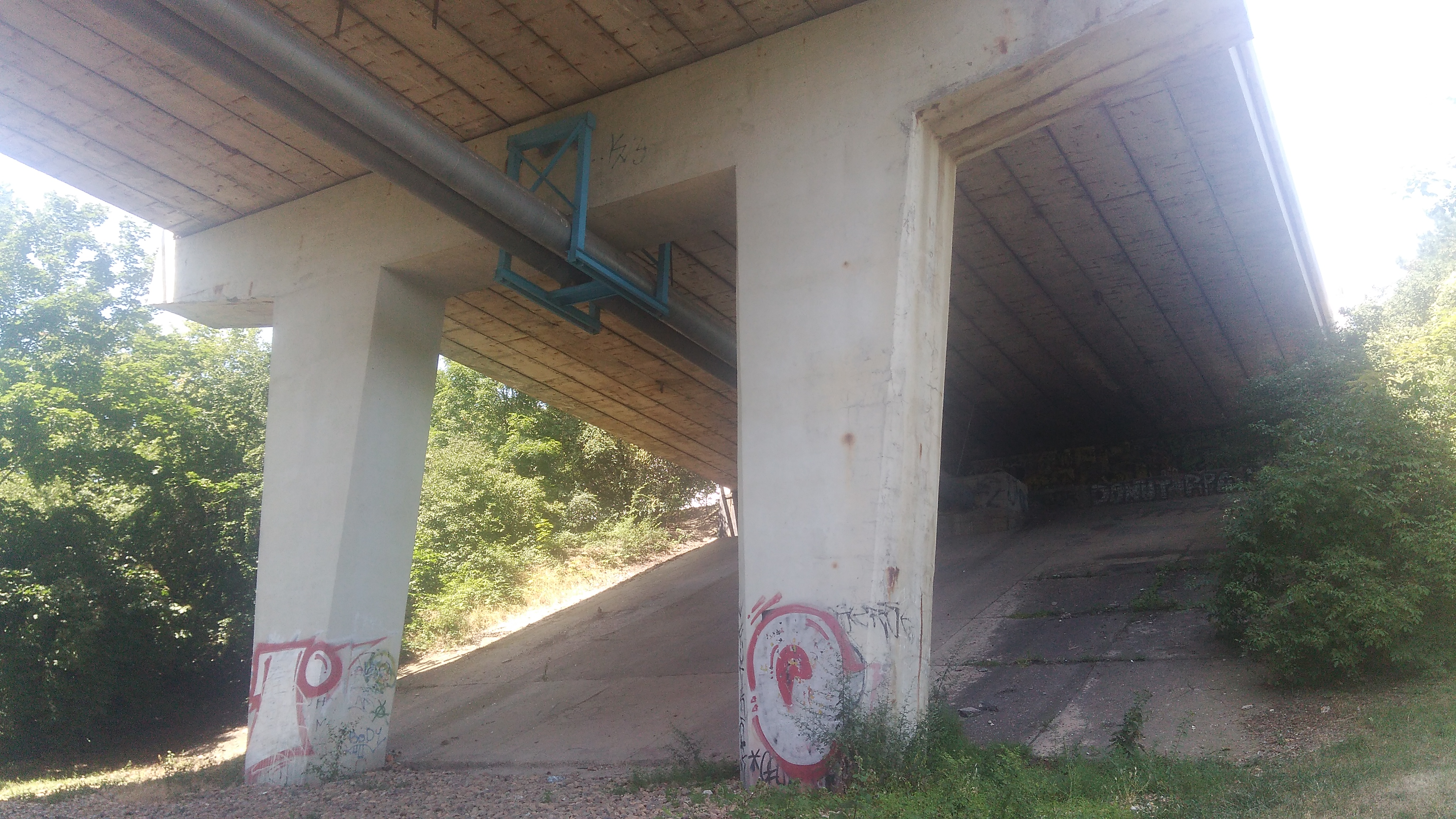 Sítenský most zdola, ke galerii